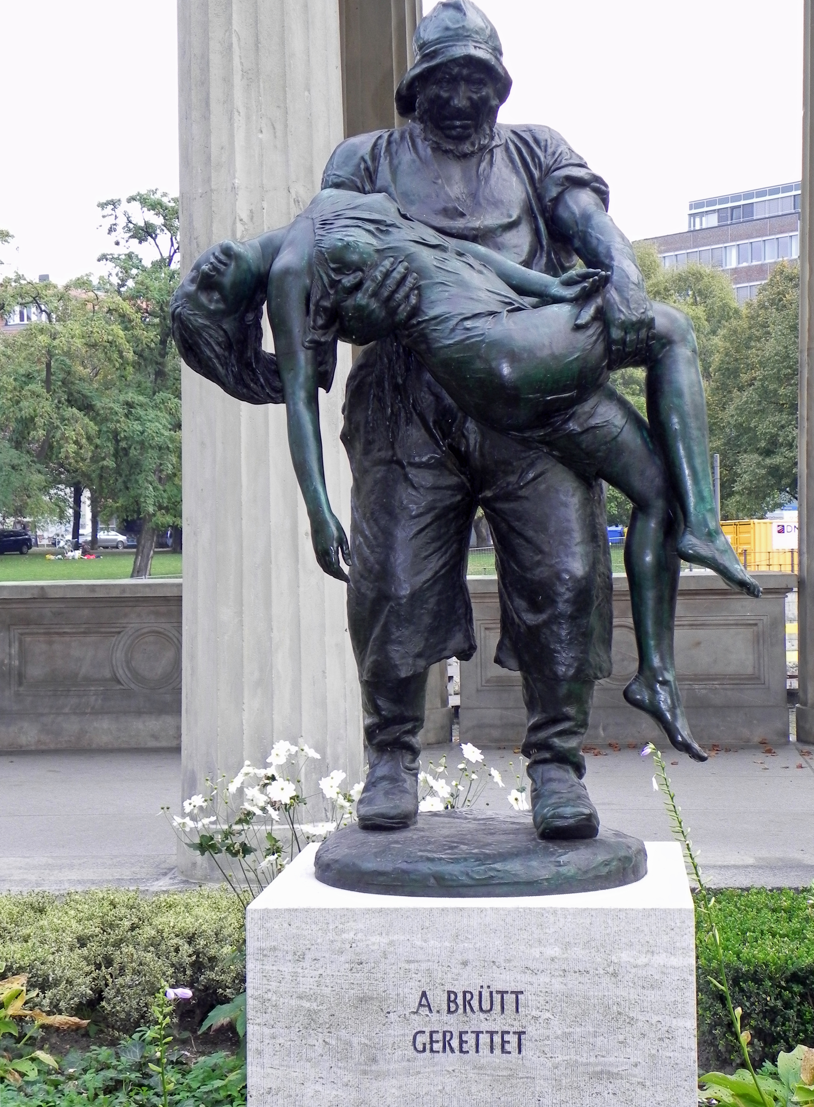 Skulptur "Gerettet" von Adolf Brütt (Zweitguss) Alte Nationalgalerie, Berlin. Das Original von 1887 steht in Flensburg beim Städtischen Museum. Früherer Name der Bronzeskulptur: "Fischer".